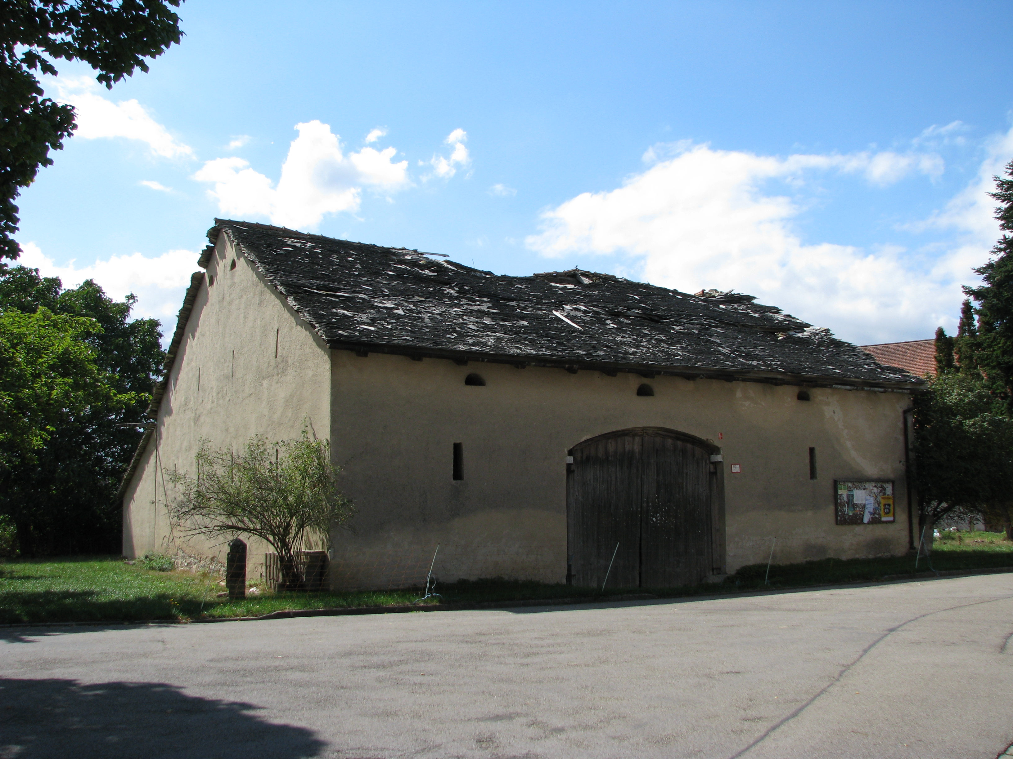 Linden, Ortsteil von Greding im mittelfränkischen Landkreis Roth in Bayern, Jurastadel bei der Wallfahrtskirche